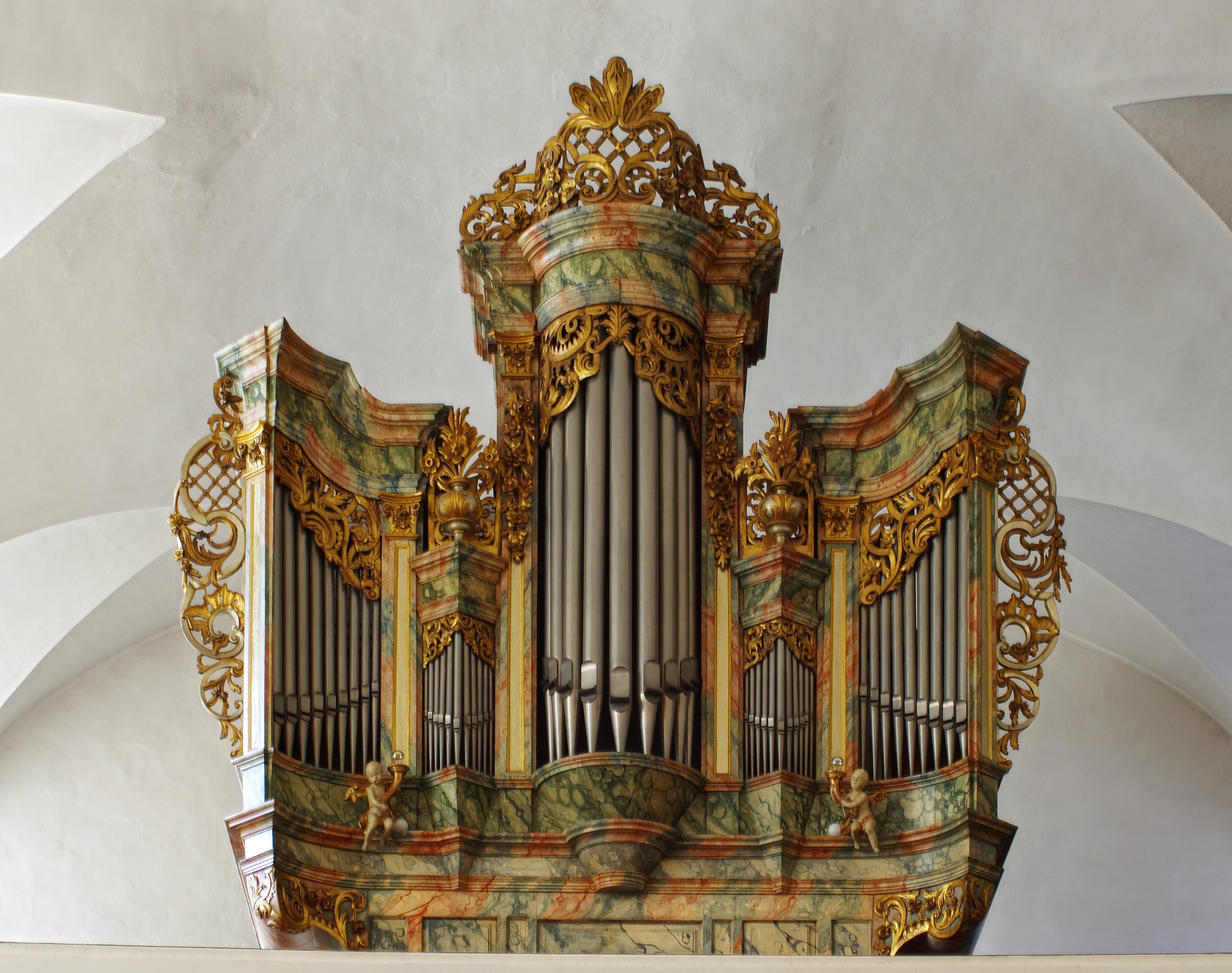 Aufnahmen aus der Adelhauser Kirche